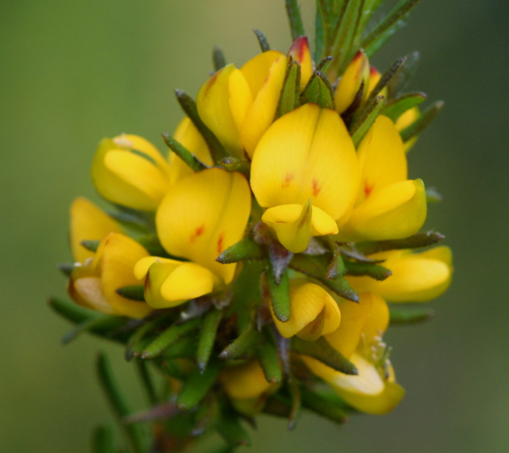 Phyllota phylicoides